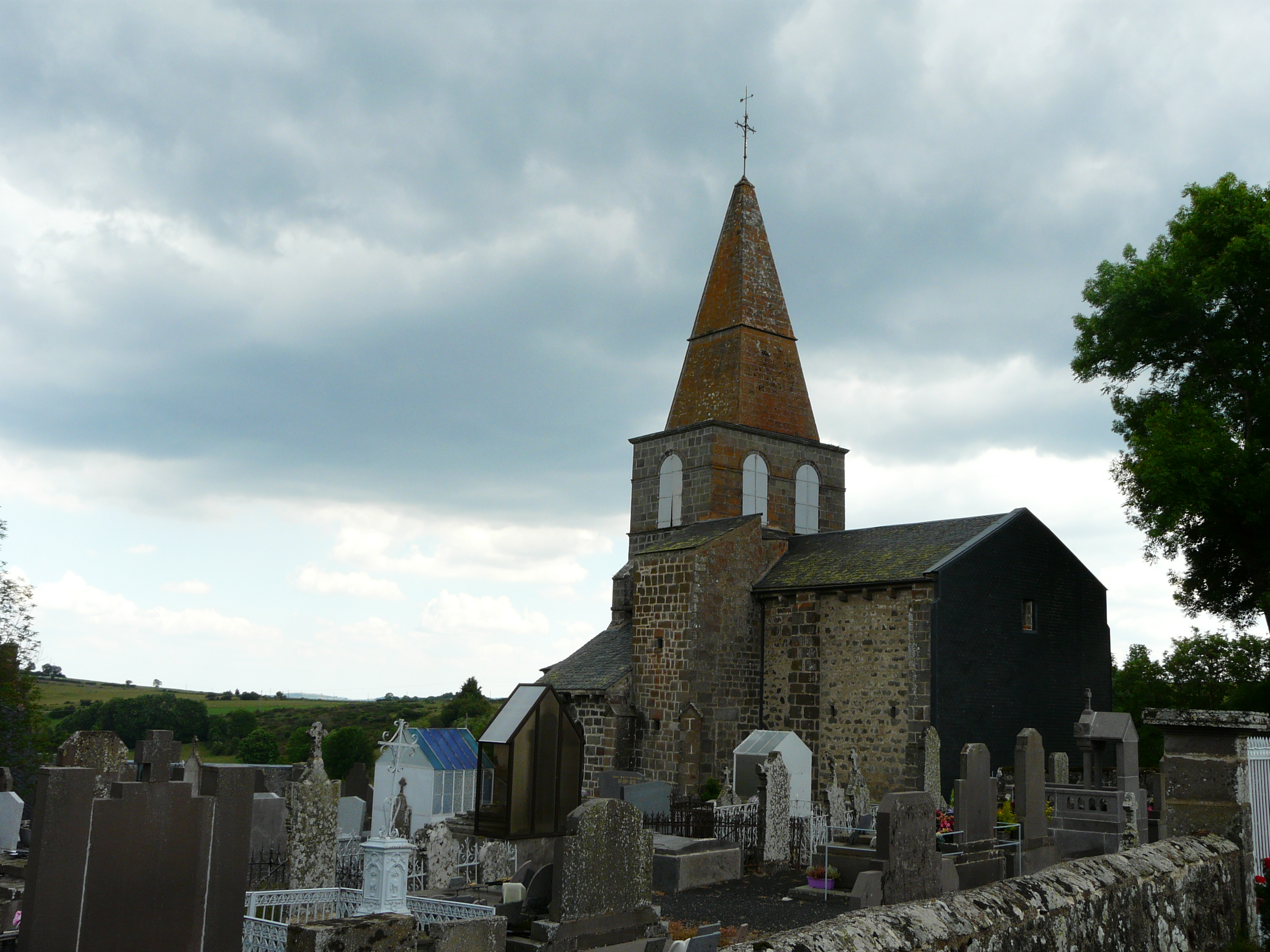 L'église Saint-Victor et son cimetière, Saint-Victor-la-Rivière, Puy-de-Dôme, France.